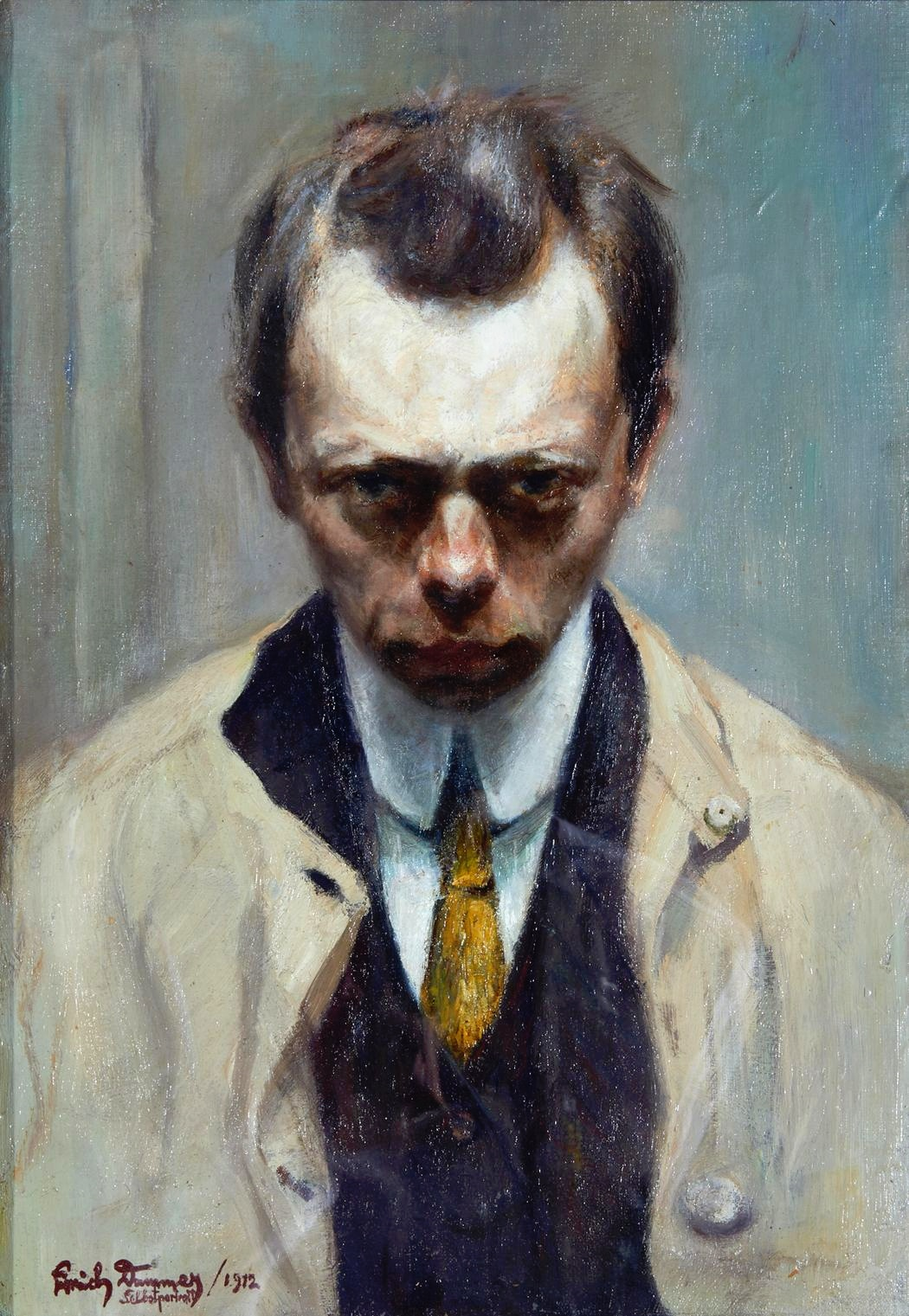 Erich Dummer (* 30. September 1889 in Lübeck; † 7. Februar 1929 ebenda), deutscher Maler. Selbstbildnis.